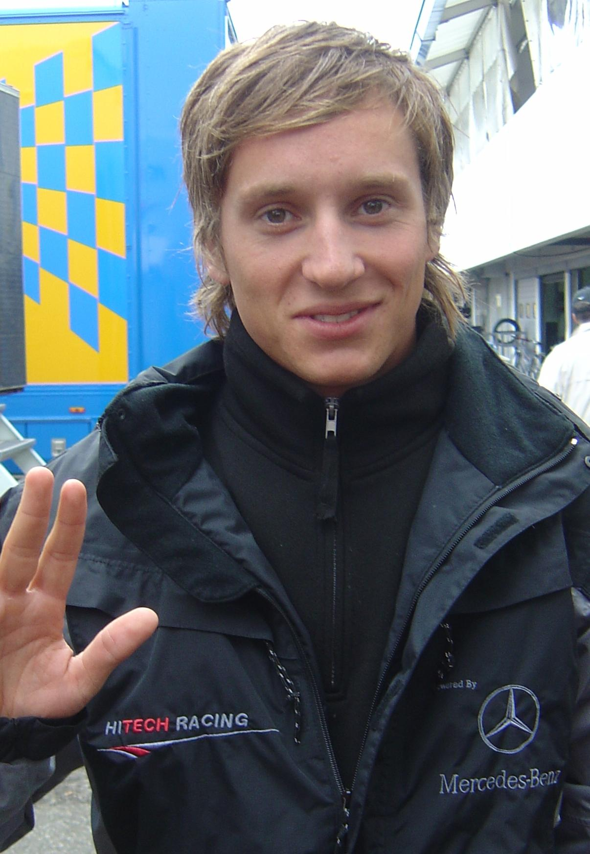 Renger van der Zande, Bild entstanden im Rahmen des ADAC GT Masters auf dem Hockenheimring.